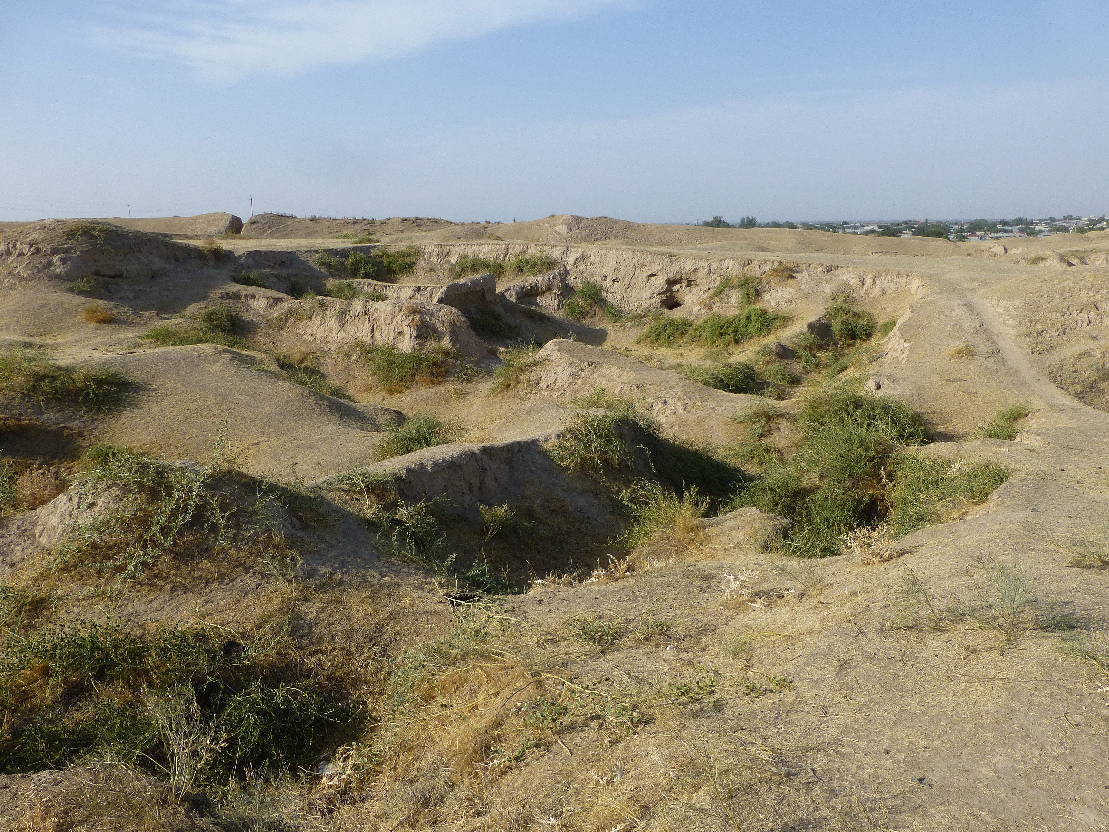 Site archéologique d'Afrasiyab (Samarcande, Ouzbékistan)